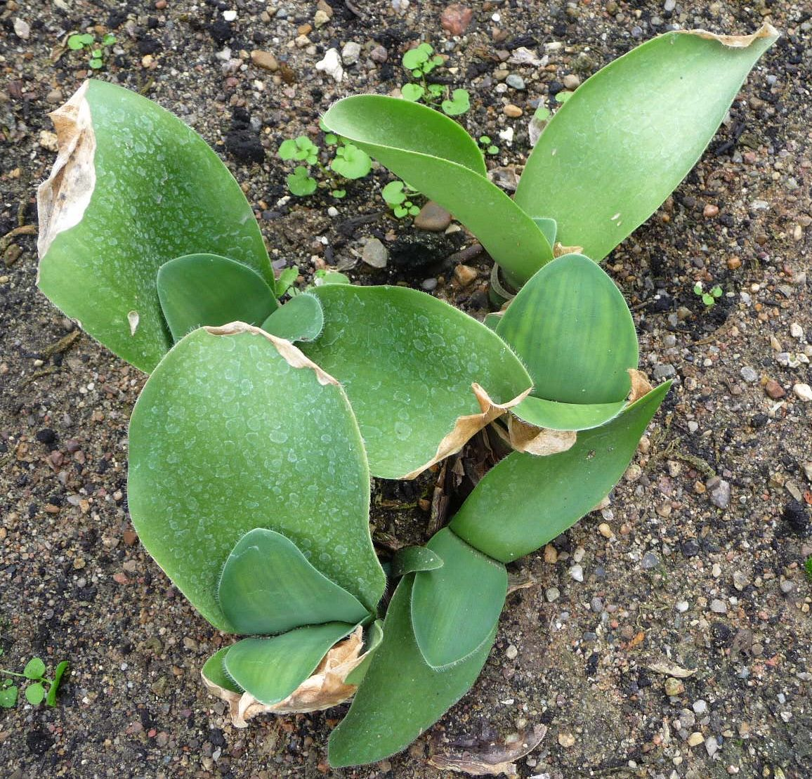 Haemanthus albiflos (Hamburgi pálmaház)